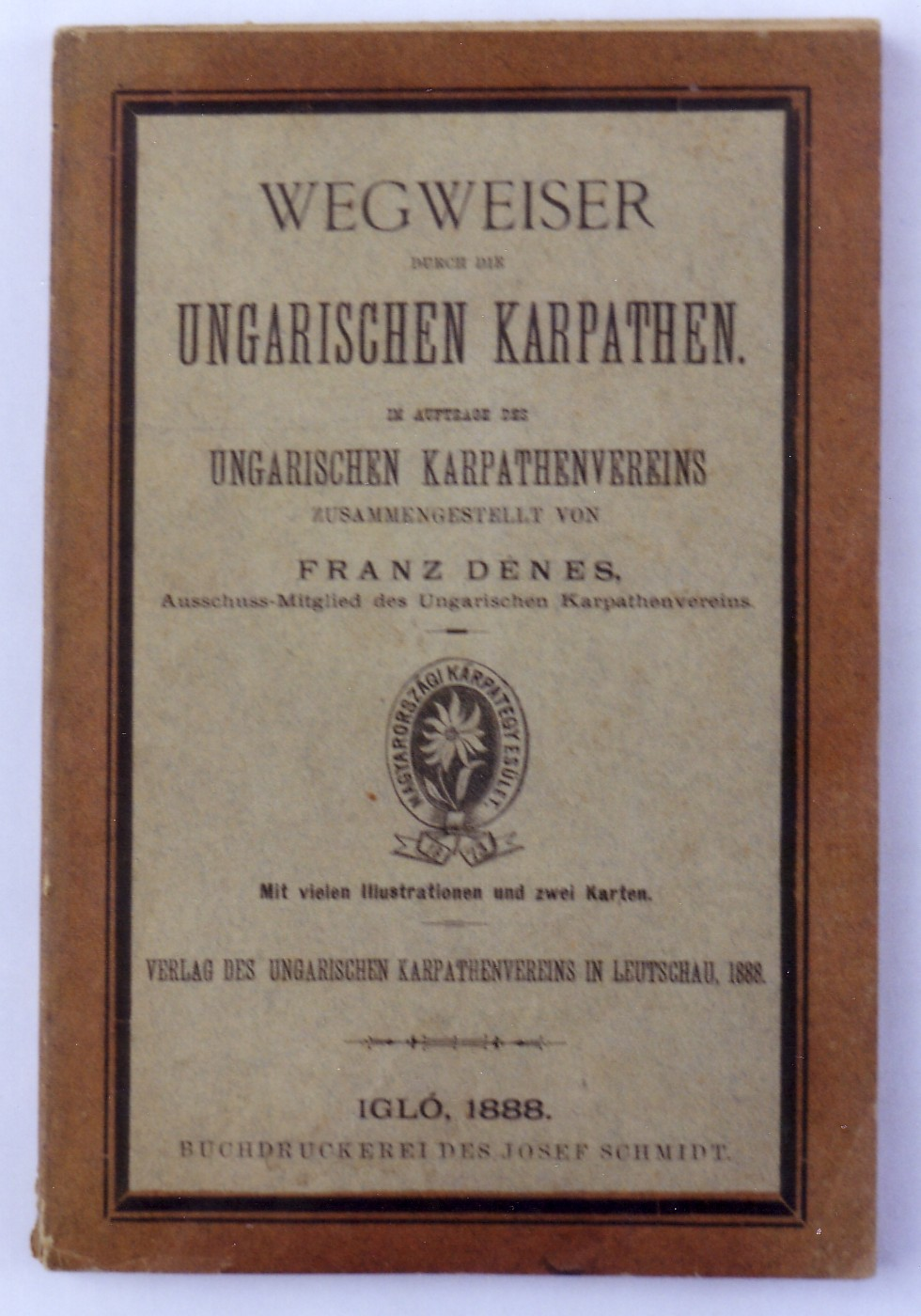 Einer der ersten Führer, herausgegeben vom Ungarischen-Karpathenverein im Jahre 1888